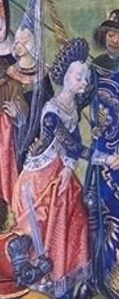 Isabela Francouzská